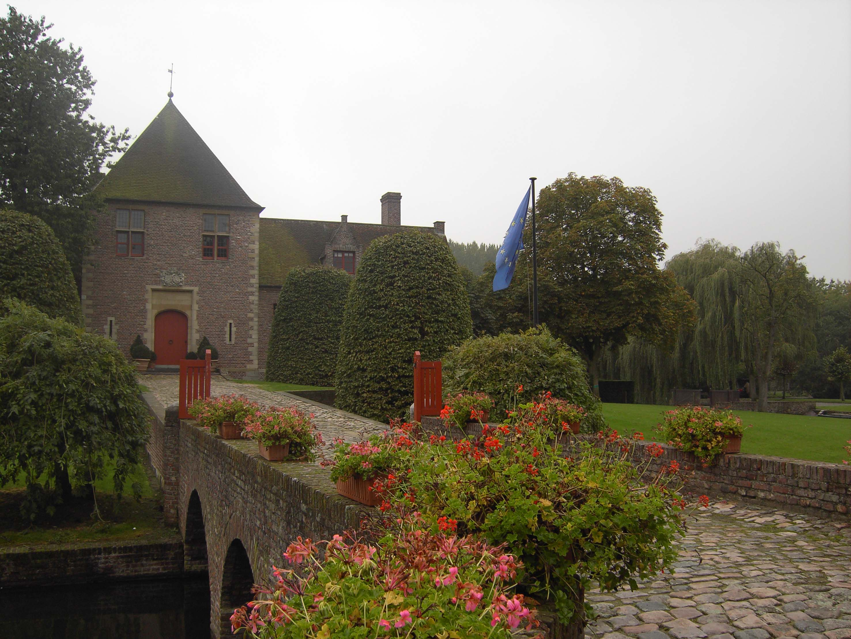 Kasteel Axelwalle - Kouterstraat - Zingem, op de grens met Heurne.